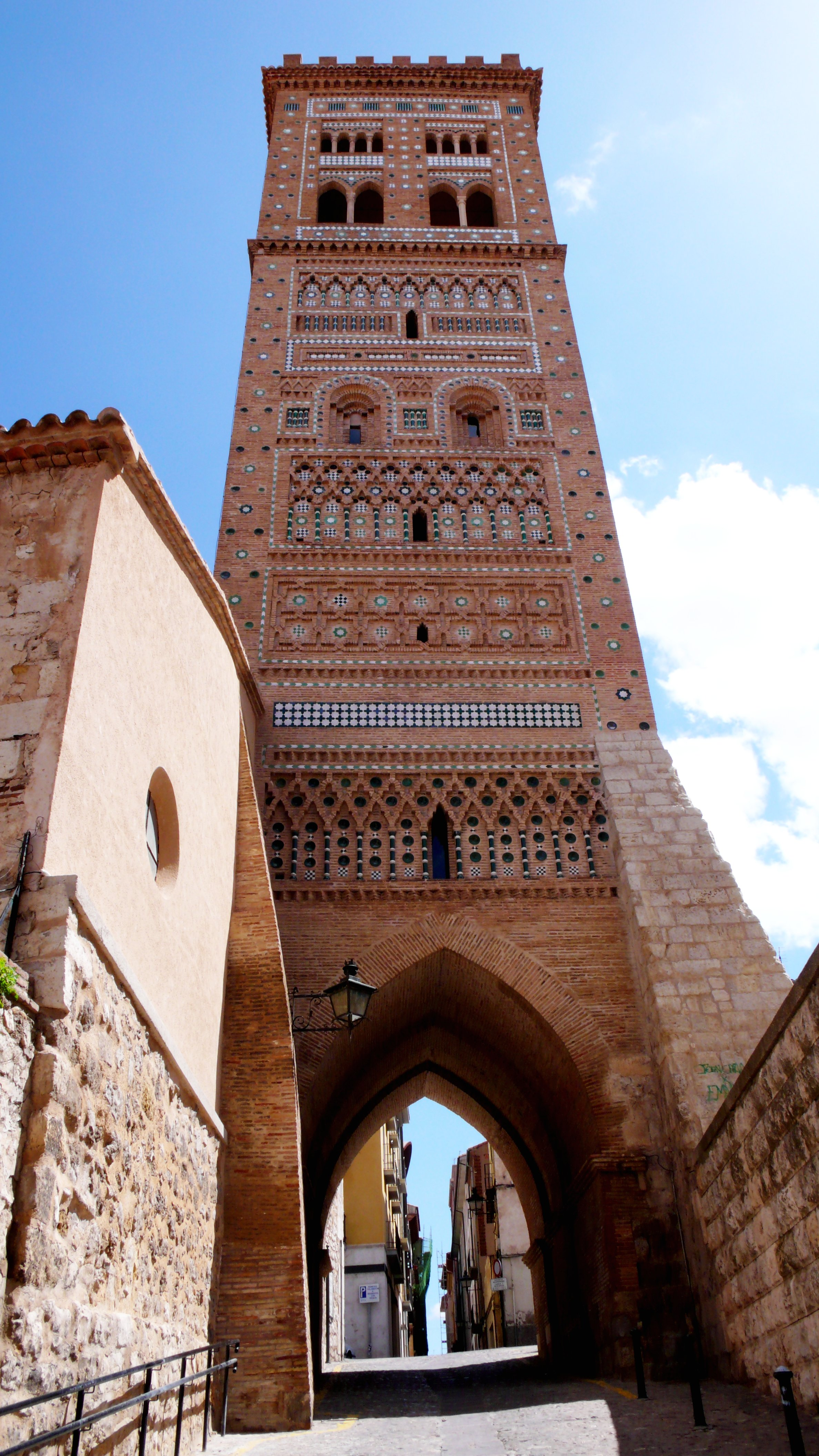 Siglo XIV, estilo mudejar, 40m de altura.